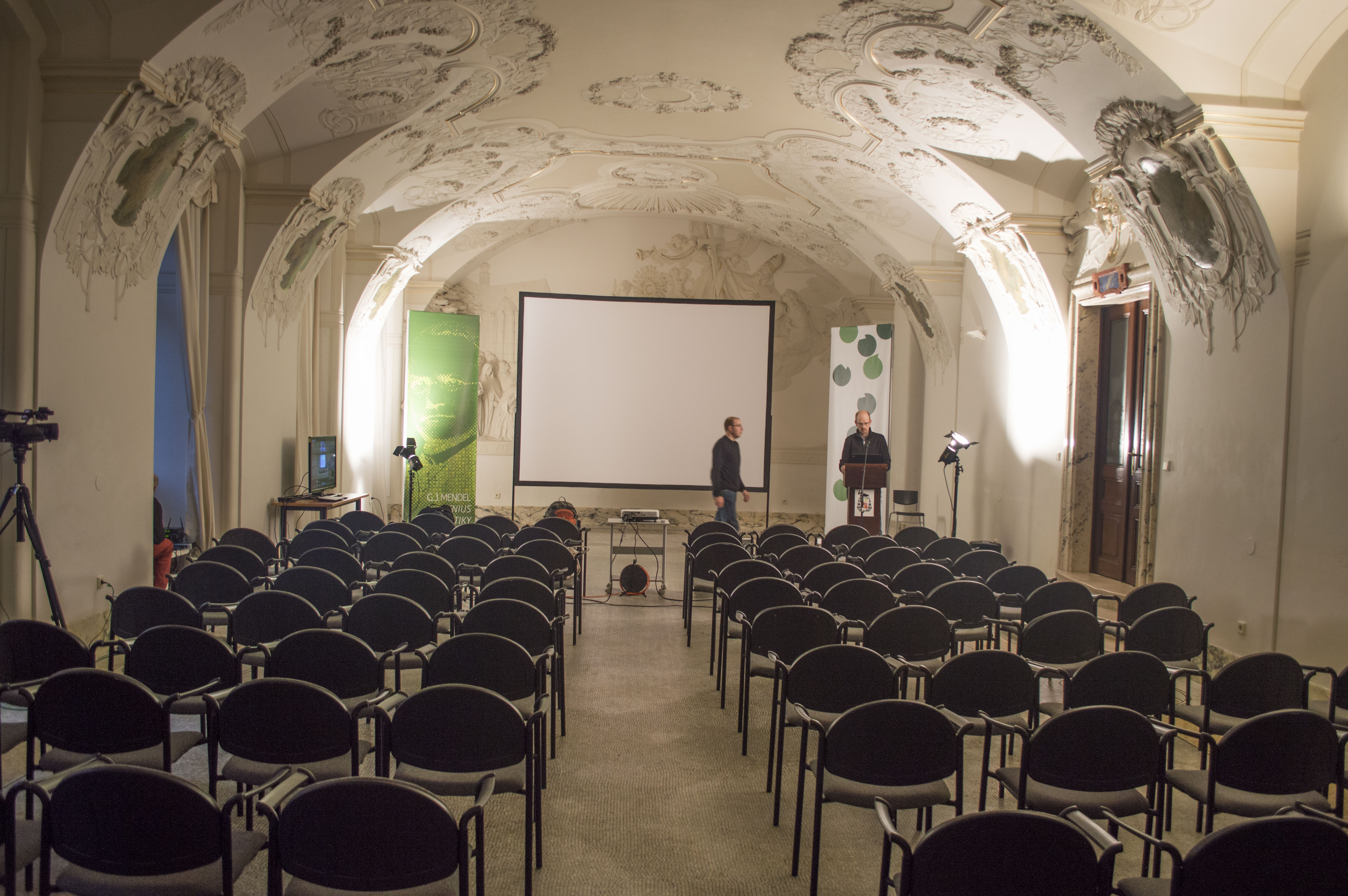 Přednáškový sál v Mendelově muzeu.